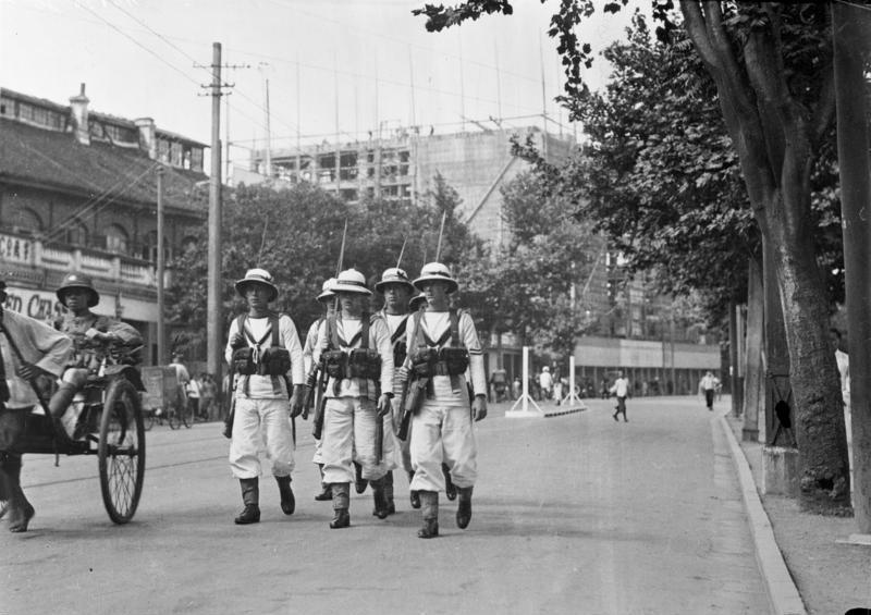 Es gährt in Indien! Schwer bewaffnete englische Matrosen-Patrouille in den Strassen Bombays zur Sicherung der oeffentlichen Ordnung.